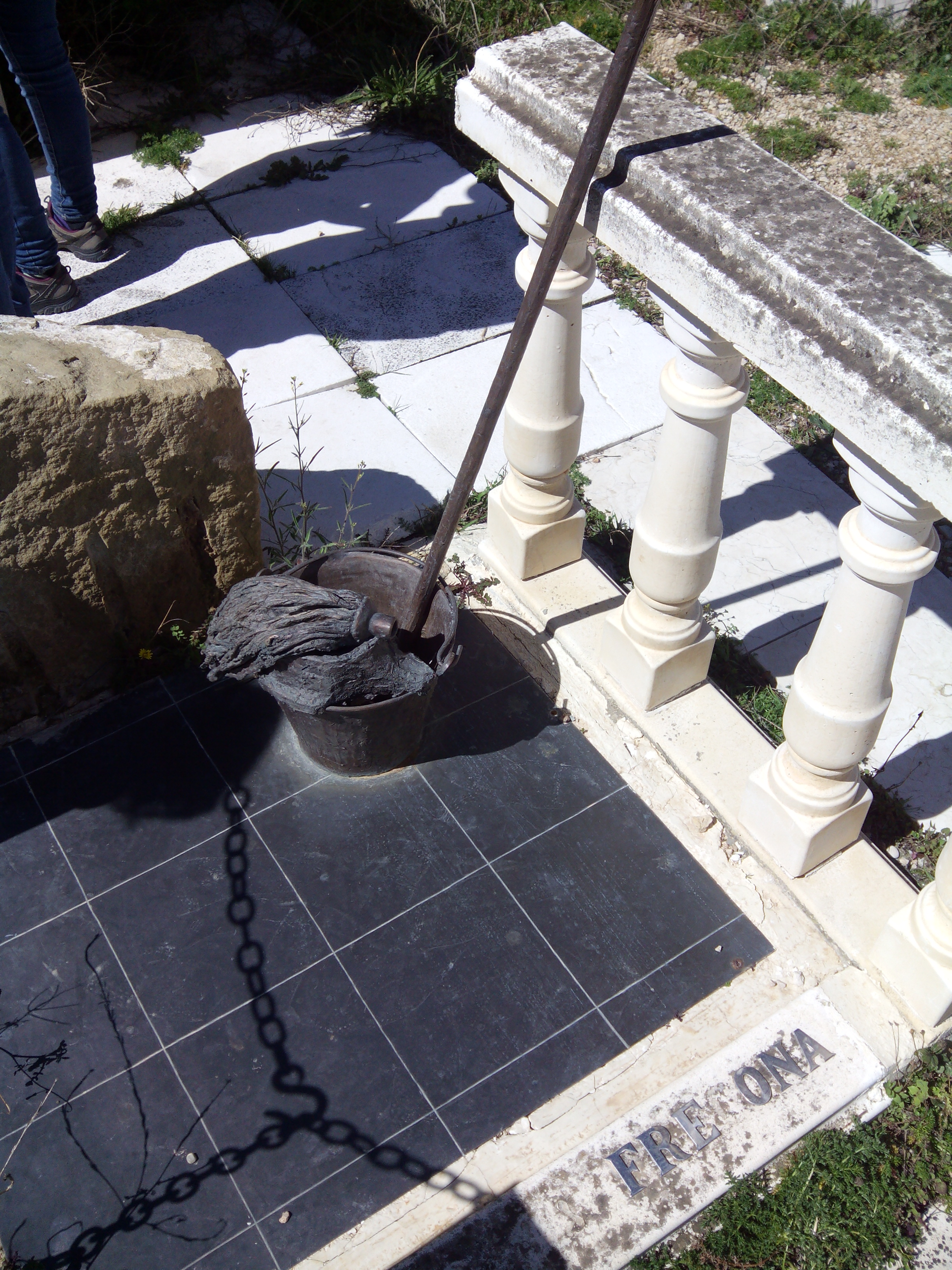 Monumento a la fregona.